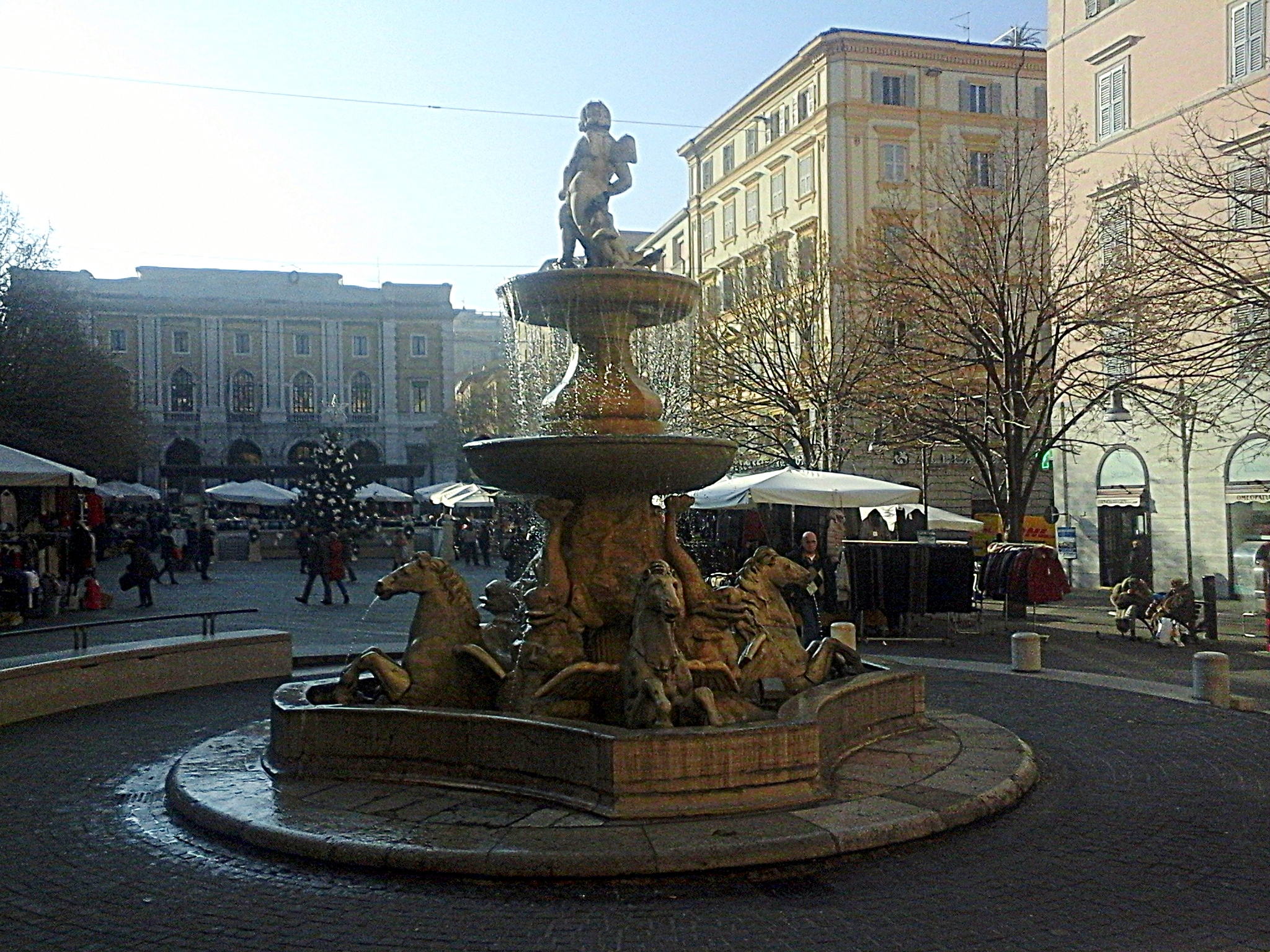 Fontana dei Cavalli, situata in Piazza Roma, in Ancona. Sculture del XVIII secolo.